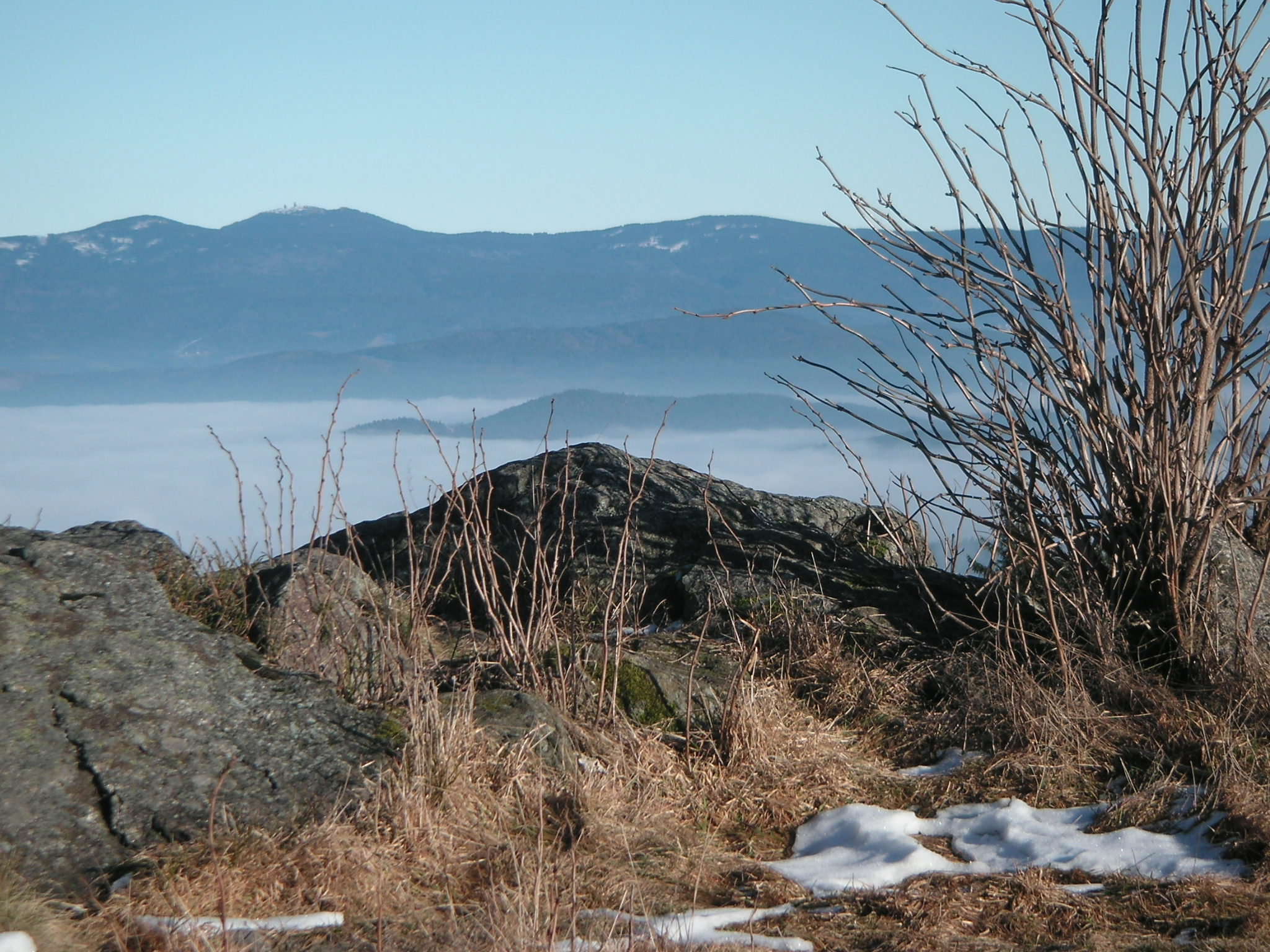 Blick vom Pröllergipfel auf die Bergkette des Bayerischen Waldes